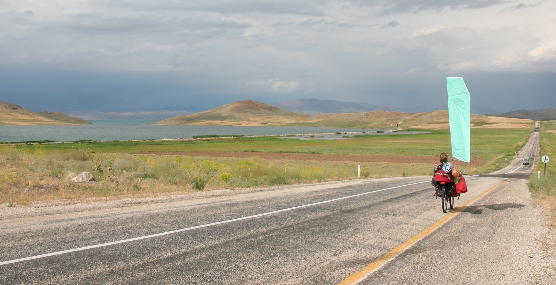 Vélo couché de marque Optima , modèle Condor, avec une voile démontable, a l'est de la Turquie au Lac Erçek près du lac Van.